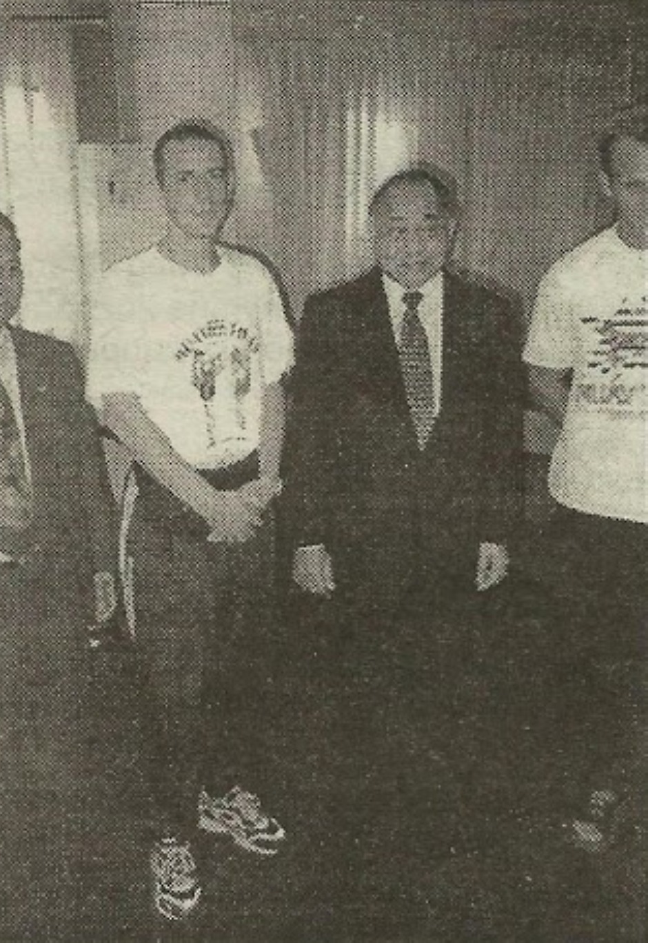 Thai box dubnica dn3 1999 26.03. 1999 3st12